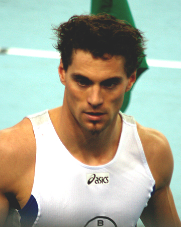 Björn Otto, German pole vaulter